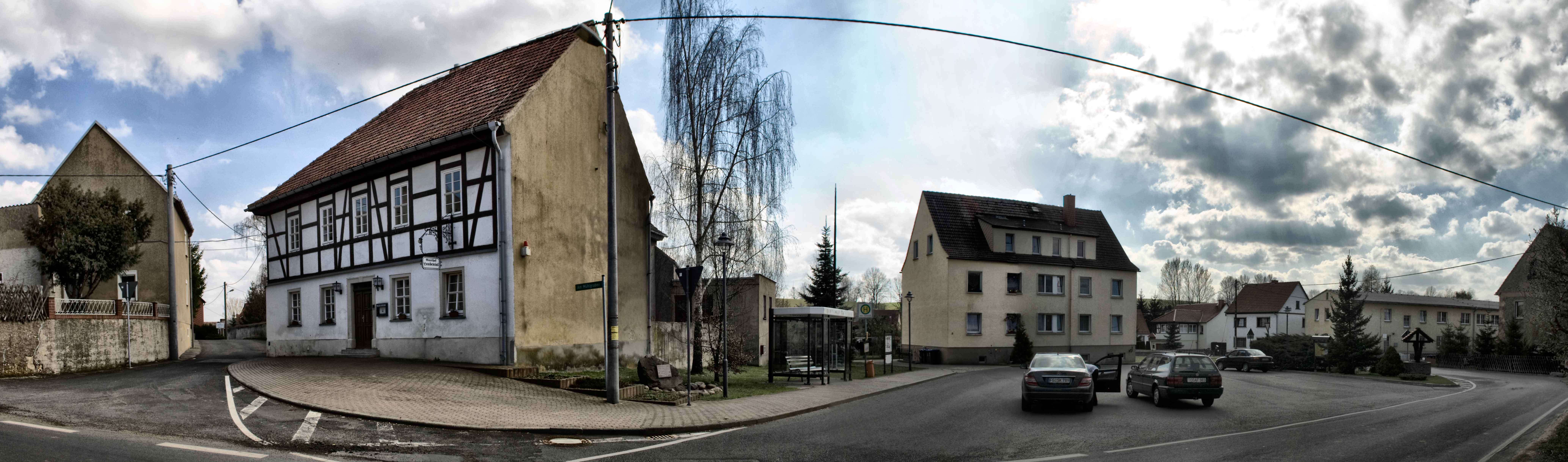 Ortsmitte Mahlis bei Wermsdorf